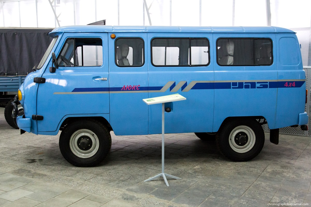 УАЗ-22069. Выставочный павильон-музей УАЗа.